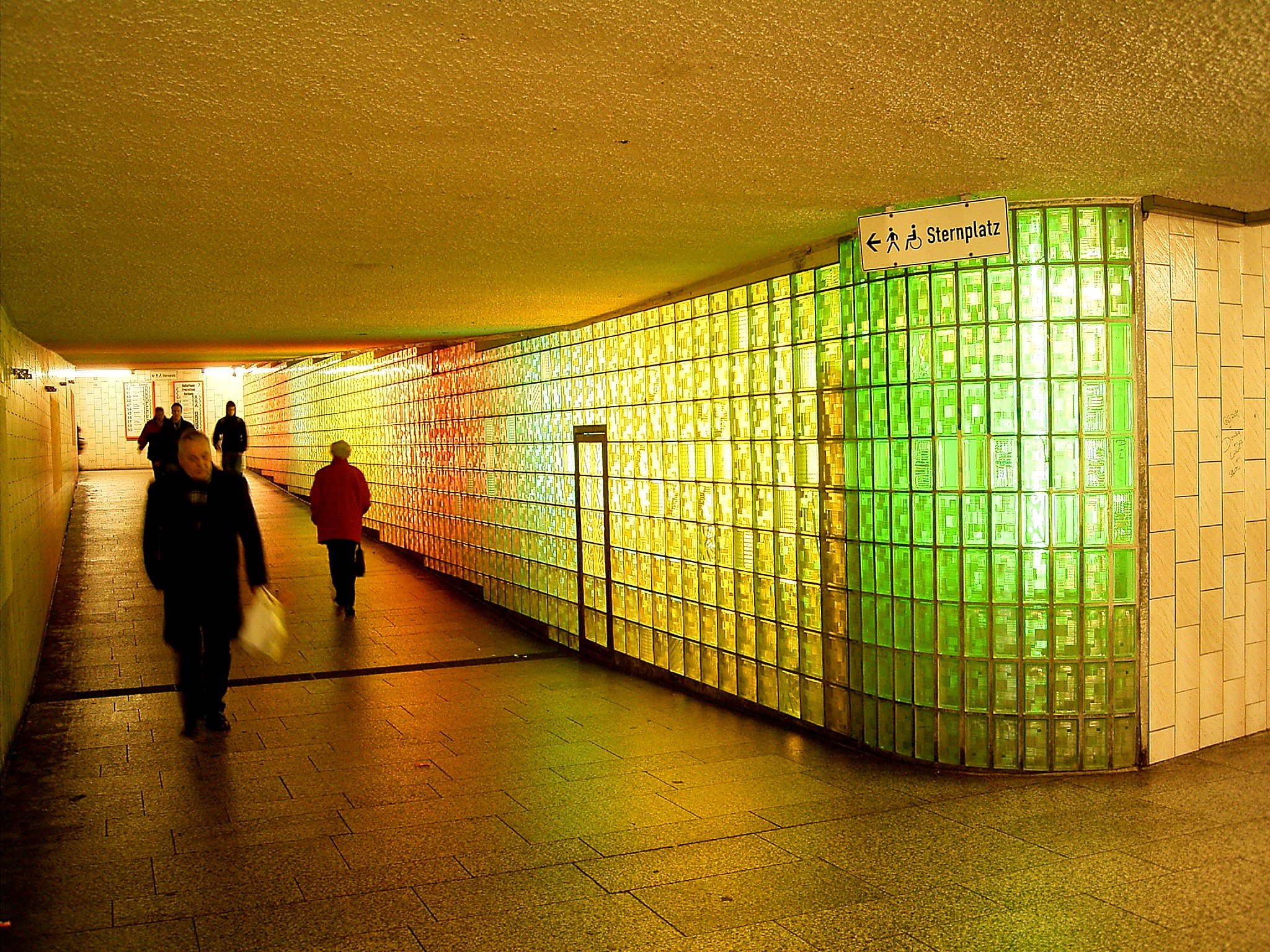 Lüdenscheid